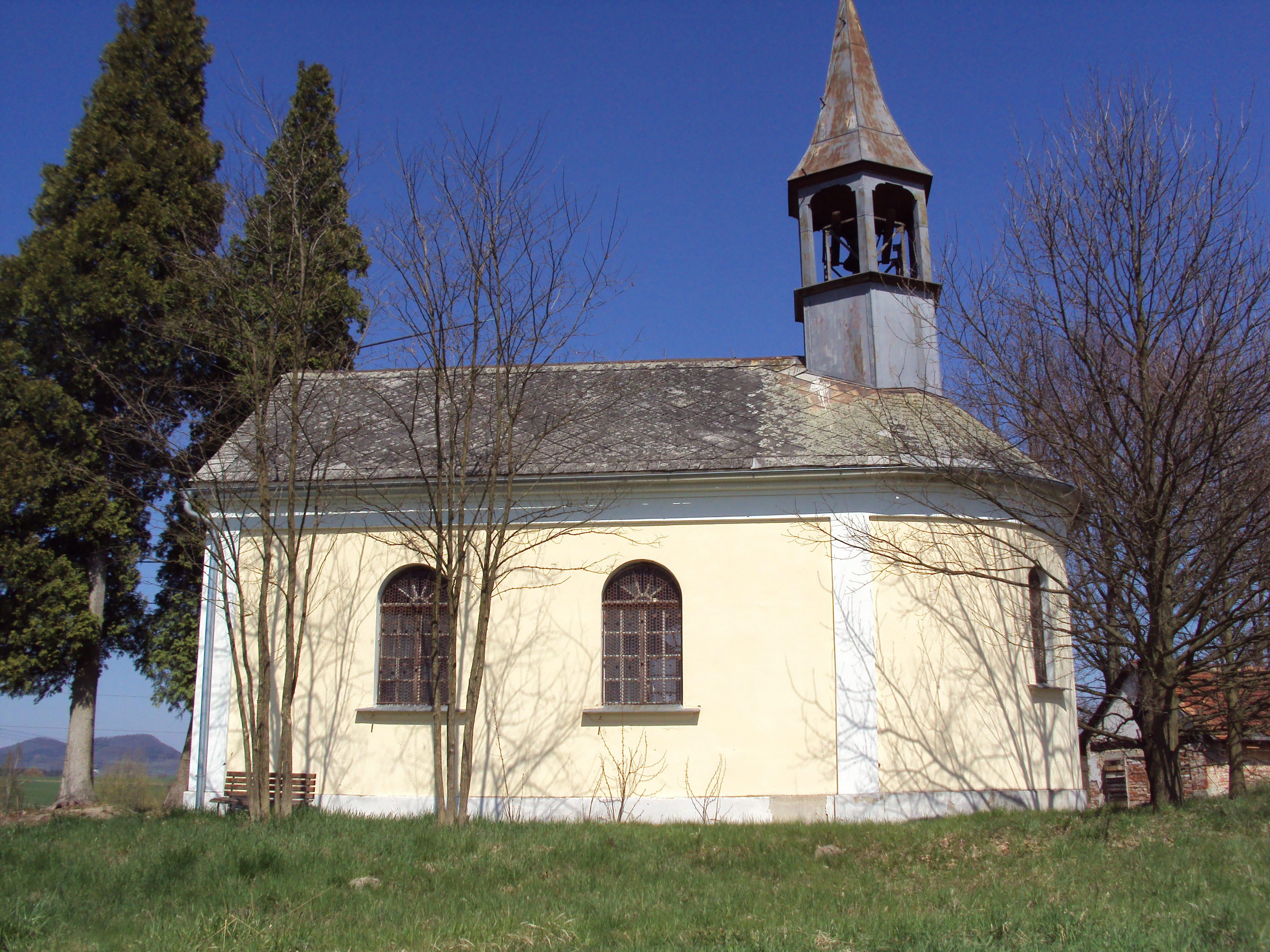 Kaple sv.Anny ve Vítkově - Vlčím Dole u České Lípy